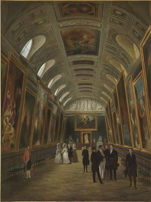 Louis-Philippe et Marie Amélie et des personnages de la Cour visitant le musée du Luxembourg, reçus par les fonctionnaires des Musées Royaux, le 2 octobre 1838 Vers 1840 // le peintre Naigeon présente aux souverains les fonctionnaires du musée en présence du duc et de la duchesse Decazes, du comte de Montalivet et du commandant militaire du Luxembourg, Douay